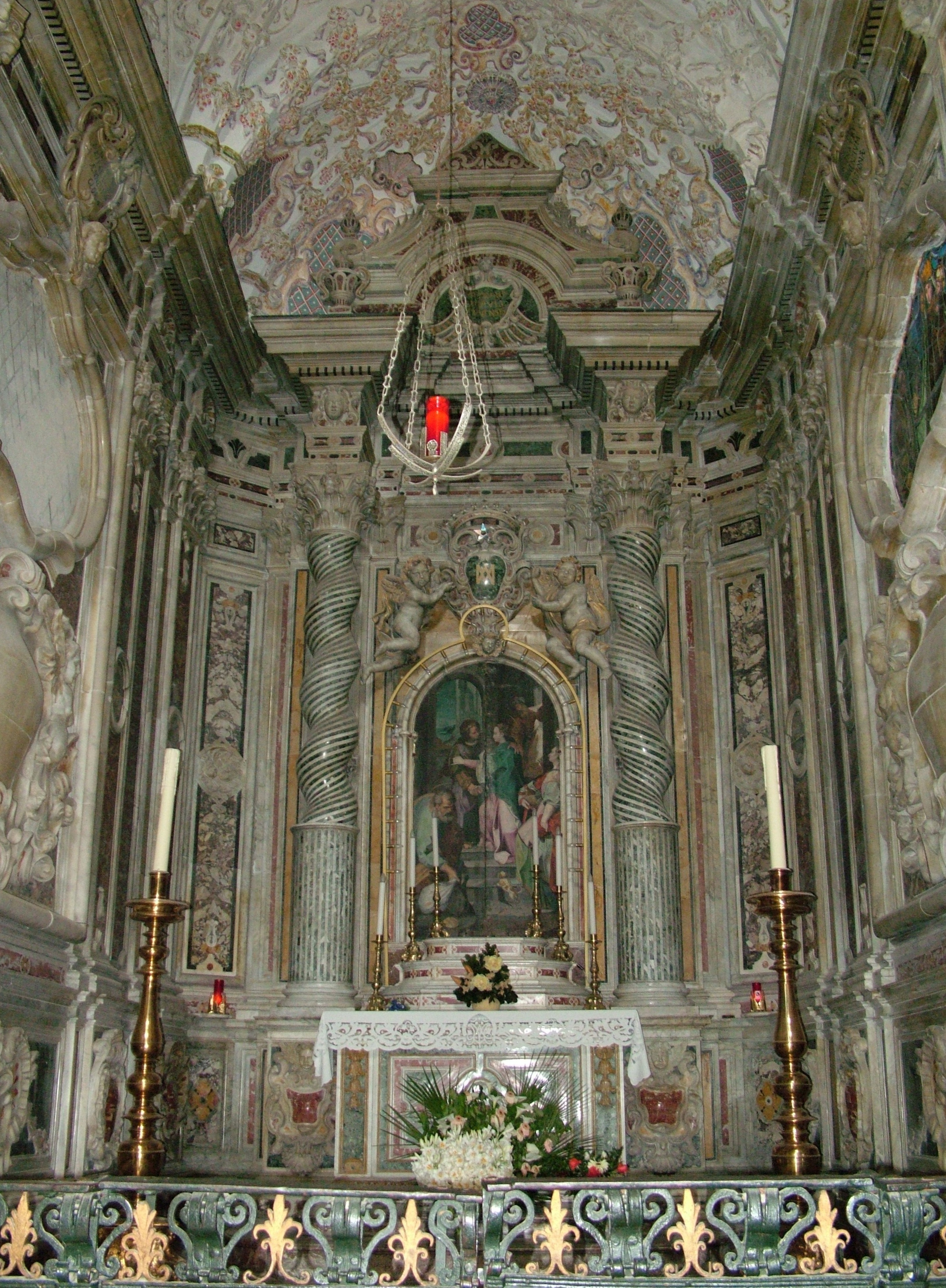 Enna, Sizilien, der Dom, Altar der Marienkapelle